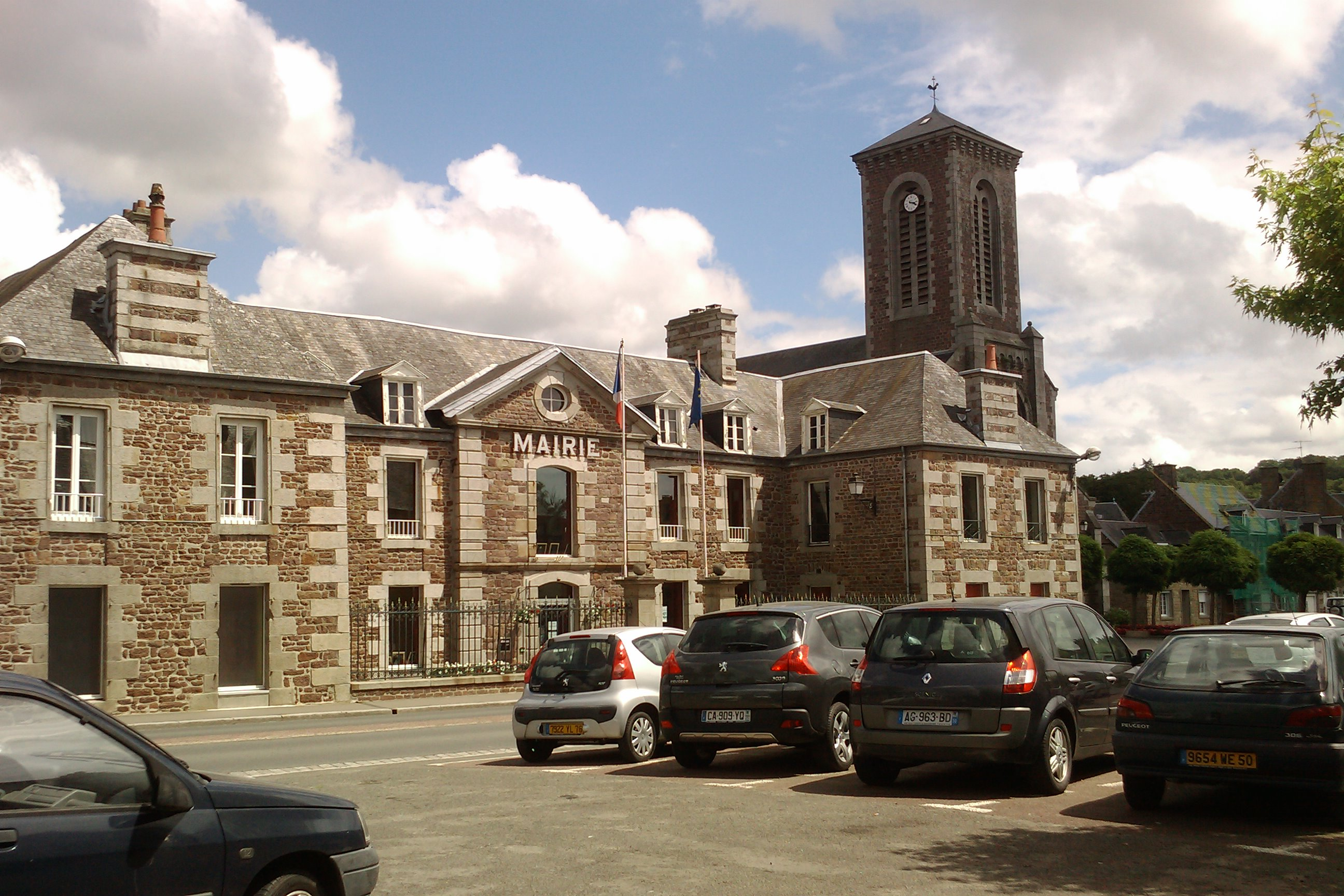 Mairie de Gavray